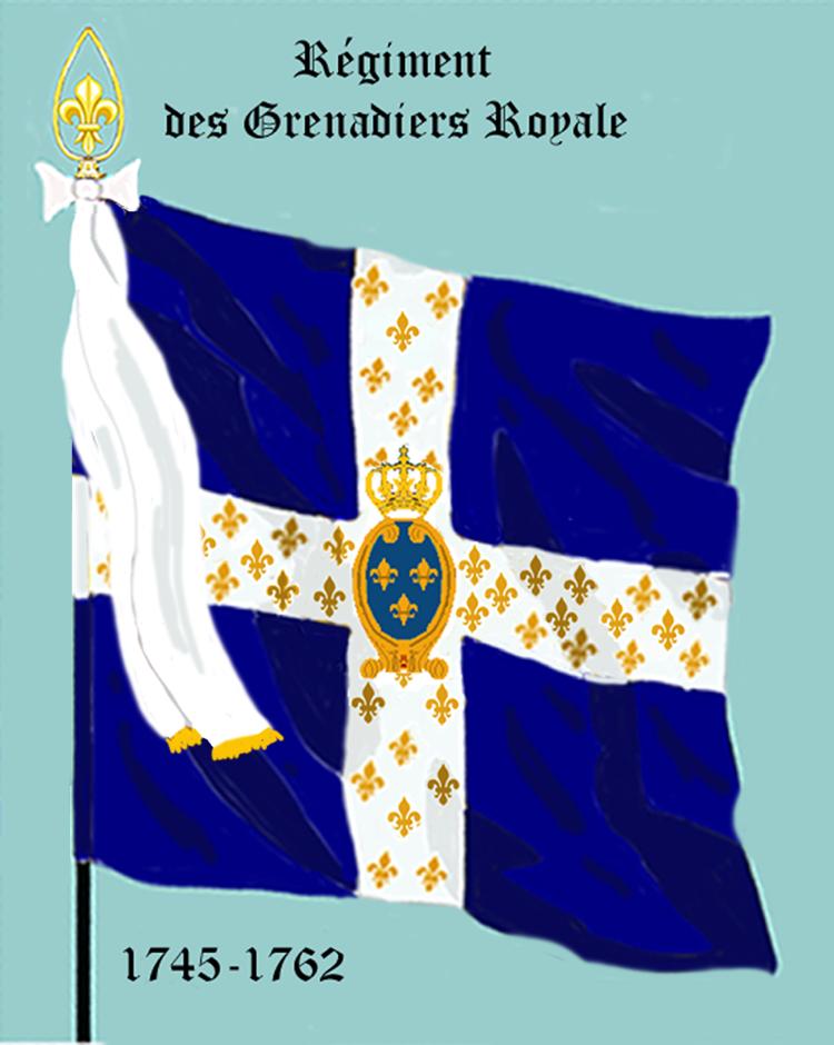 Ordonnanzfahne eines königlich französischen Infanterie-Regiments. - Entnommen und überarbeitet aus: „LES UNIFORMES ET LES DRAPEAUX DE L'ARMÉE DU ROI“ Marseille 1899. (Drapeau d'ordonnance d' un régiment française d'infanterie royale.)